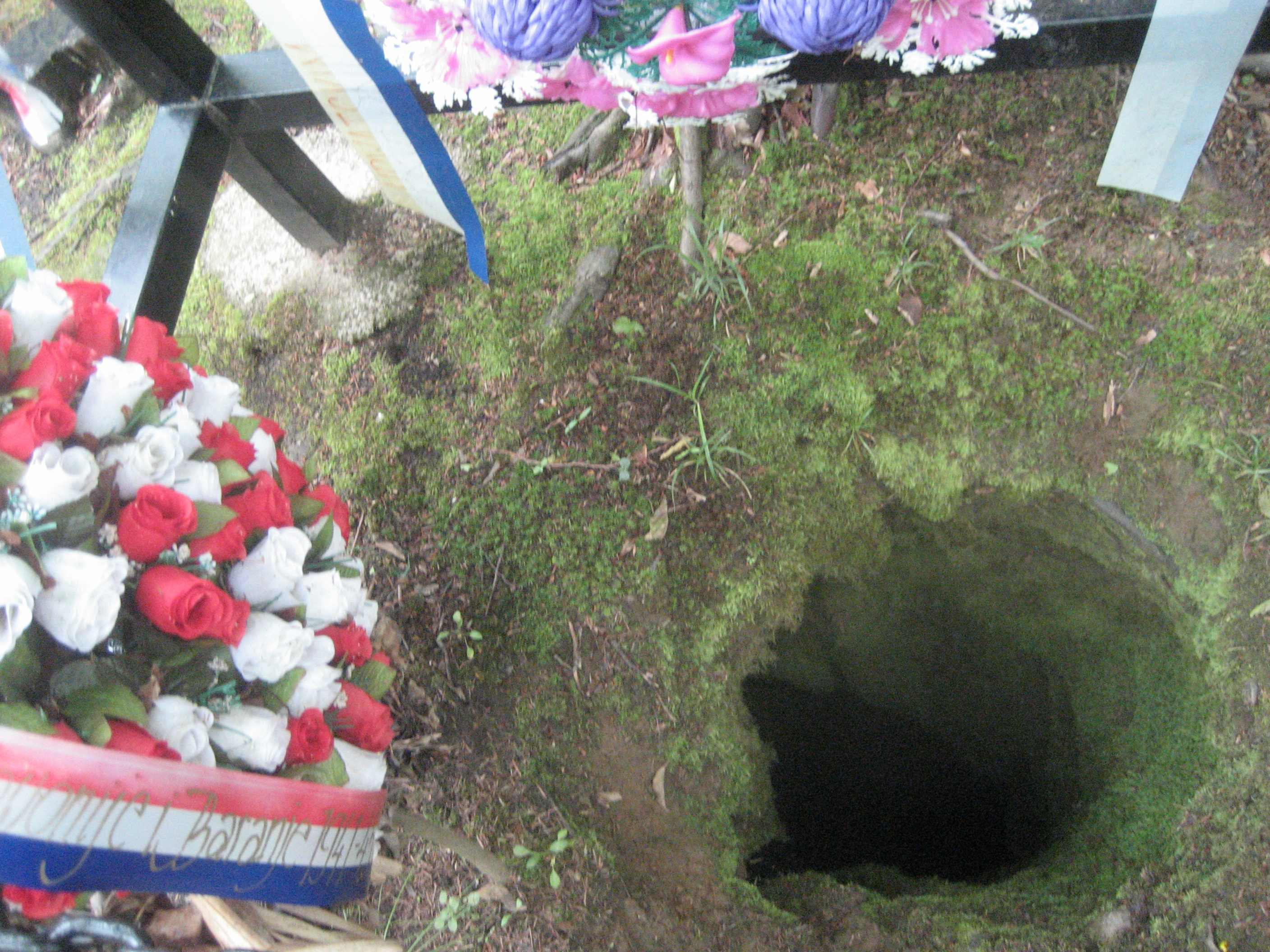 Jazovka4, Croatia